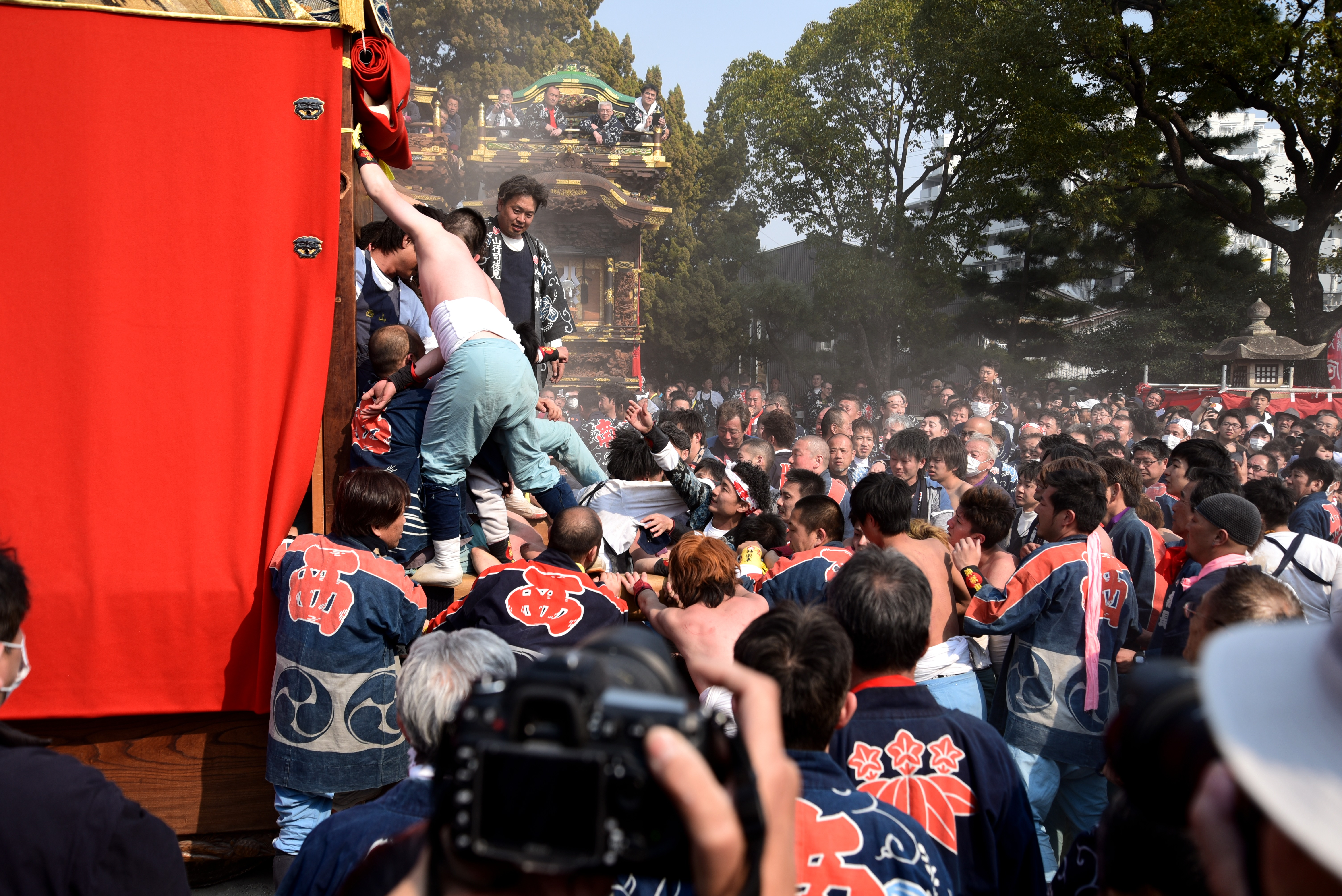 愛知県半田市の乙川祭禮。一番楫の奪い合い